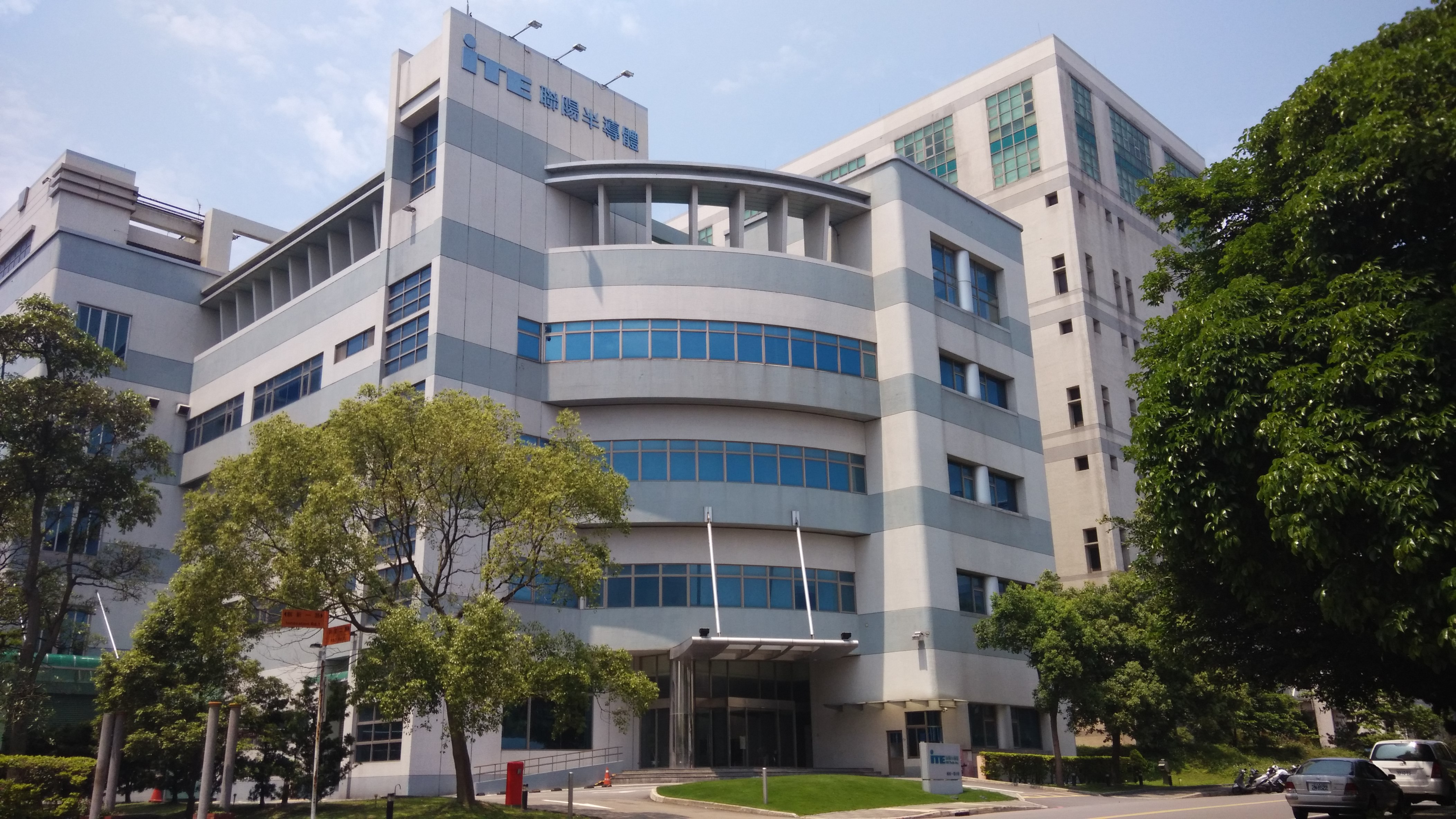 中文（台灣）: 位在臺灣新竹科學工業園區創新一路9號的聯陽半導體大樓